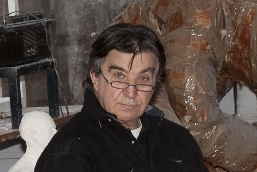 Ivica Šiško.